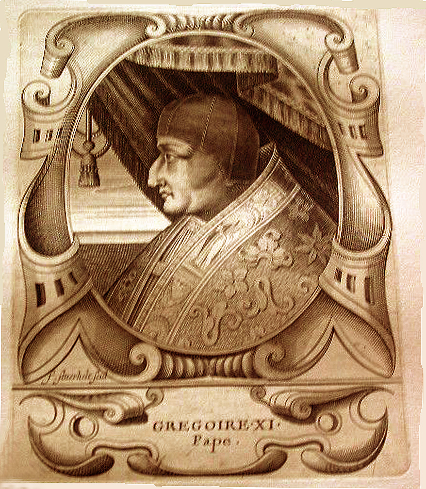 Grégoire XI gravure sur cuivre du XIXe s